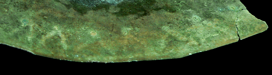 Verzierungen an einer Lunula des Kupferschatzes von Osnabrück